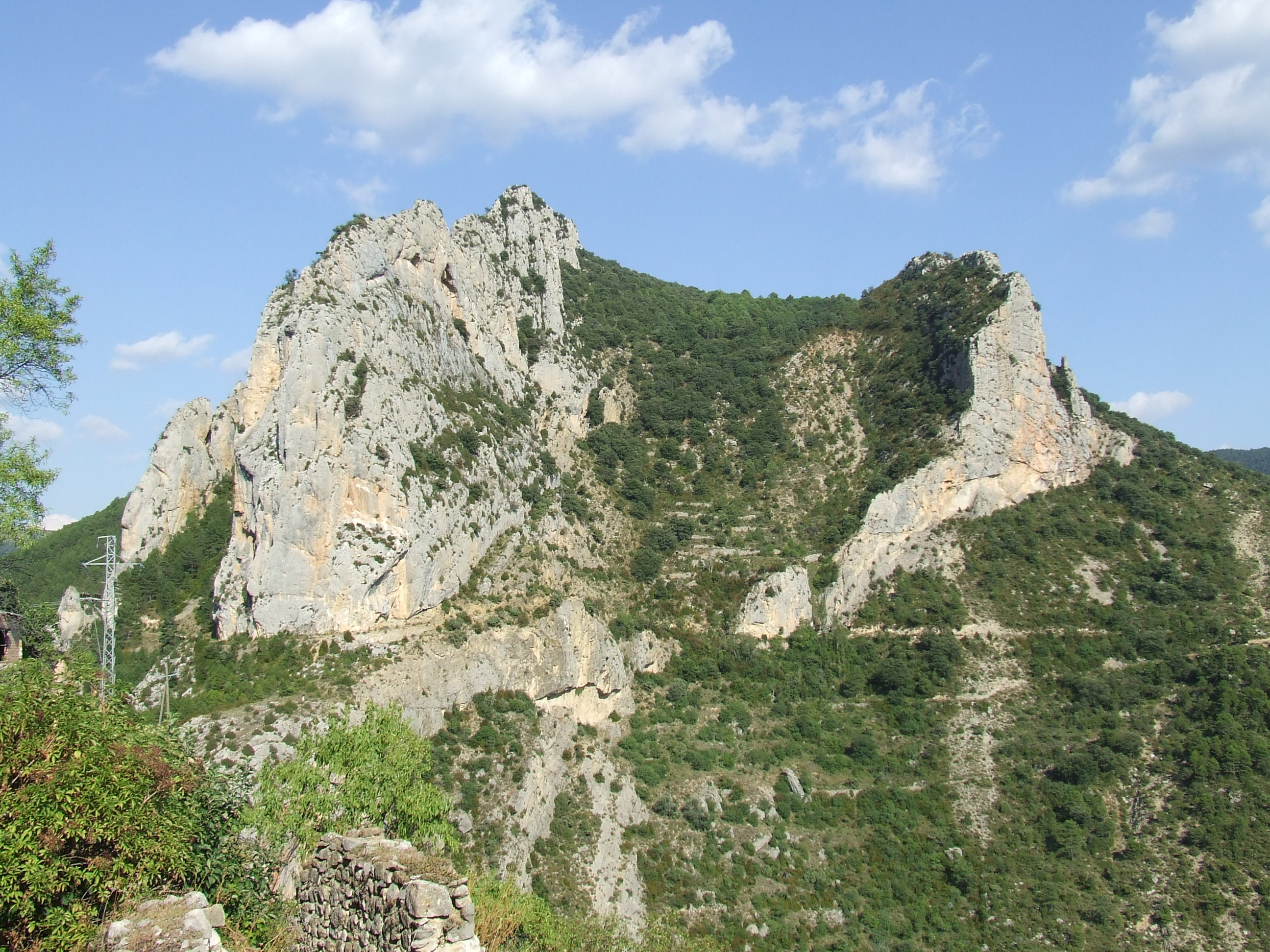 Extrem de ponent de la Serra de Carrànima, davant mateix del poble d'Abellla de la Conca (Pallars Jussà)